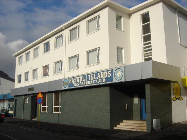 Rannsóknarsetrið í Vestmannaeyjum; mynd: Smári McCarthy